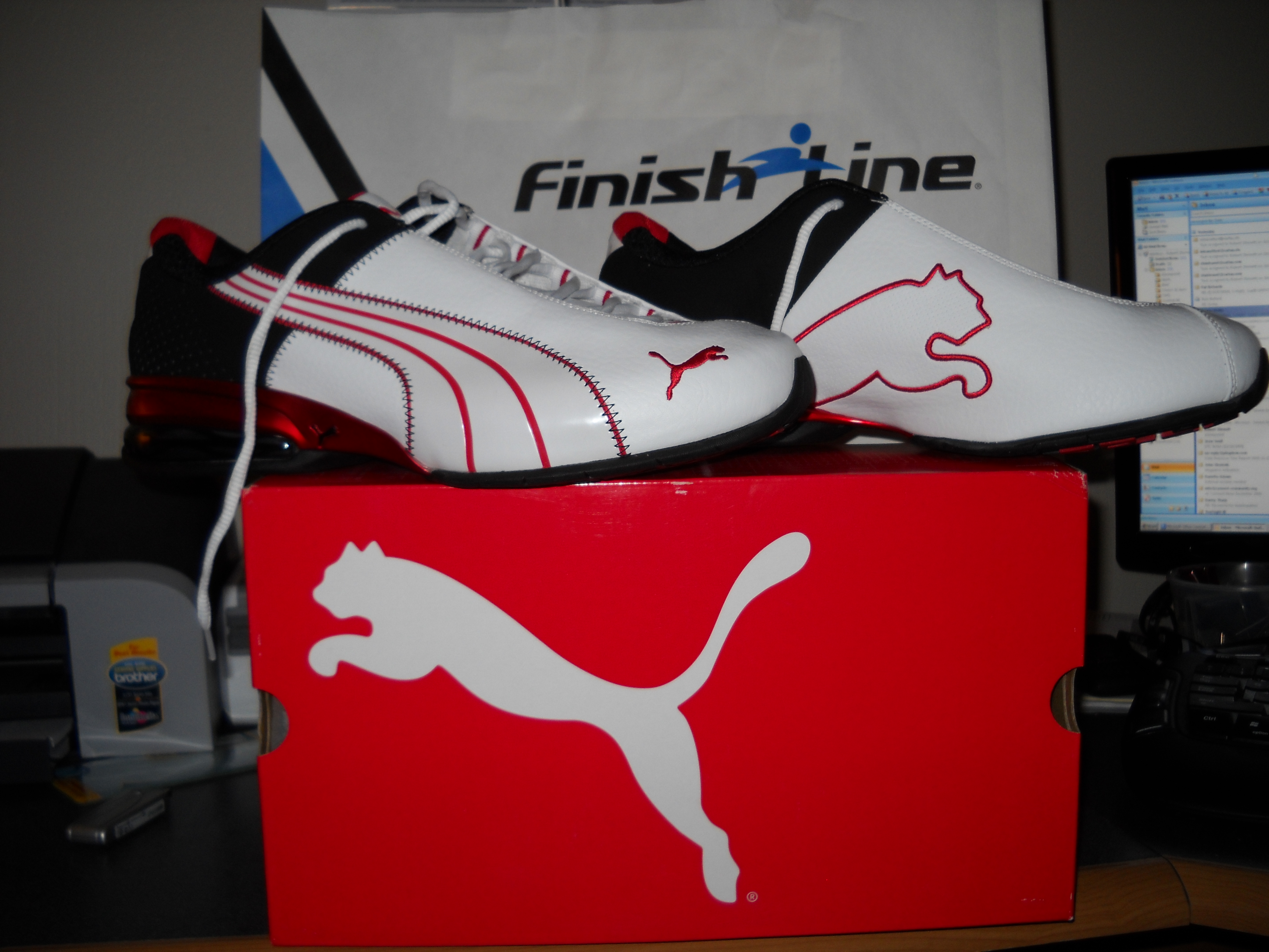 Puma Jago Zig Zag Running Shoe